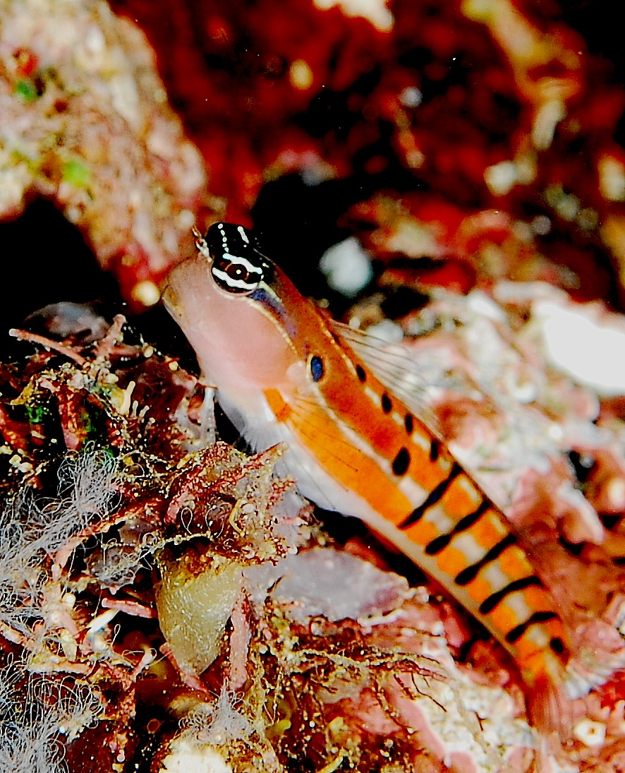 Ecsenius axelrodiblenny